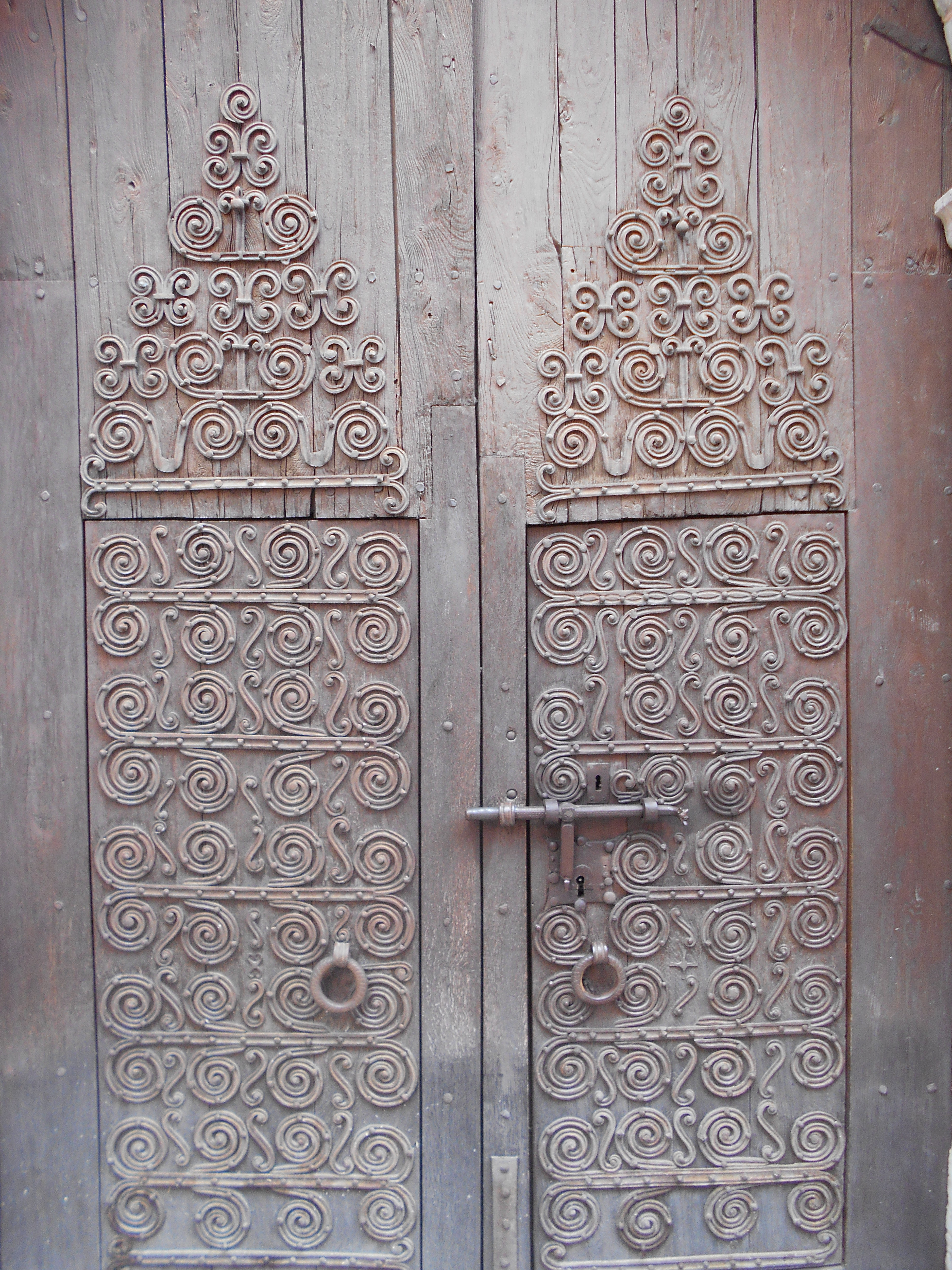 Ferramenta romànica de Sant Julià i Santa Basilissa de Vinçà, al Conflent